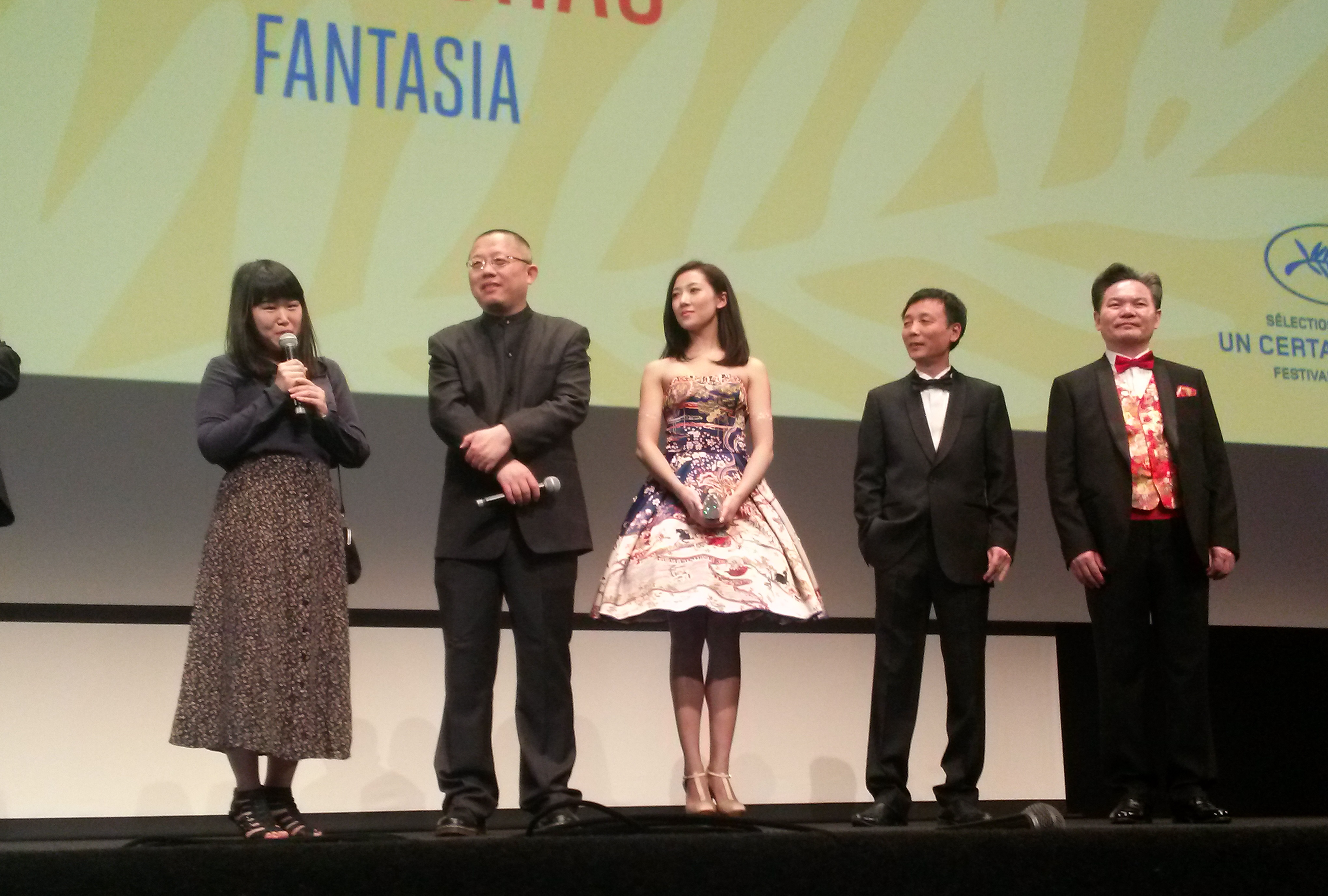 Présentation du film Fantasia au festival de Cannes (Sélection Un certain regard) en 2014. Wang Chao est le deuxième à partir de la gauche. L'actrice RenZi JIAN est au centre.